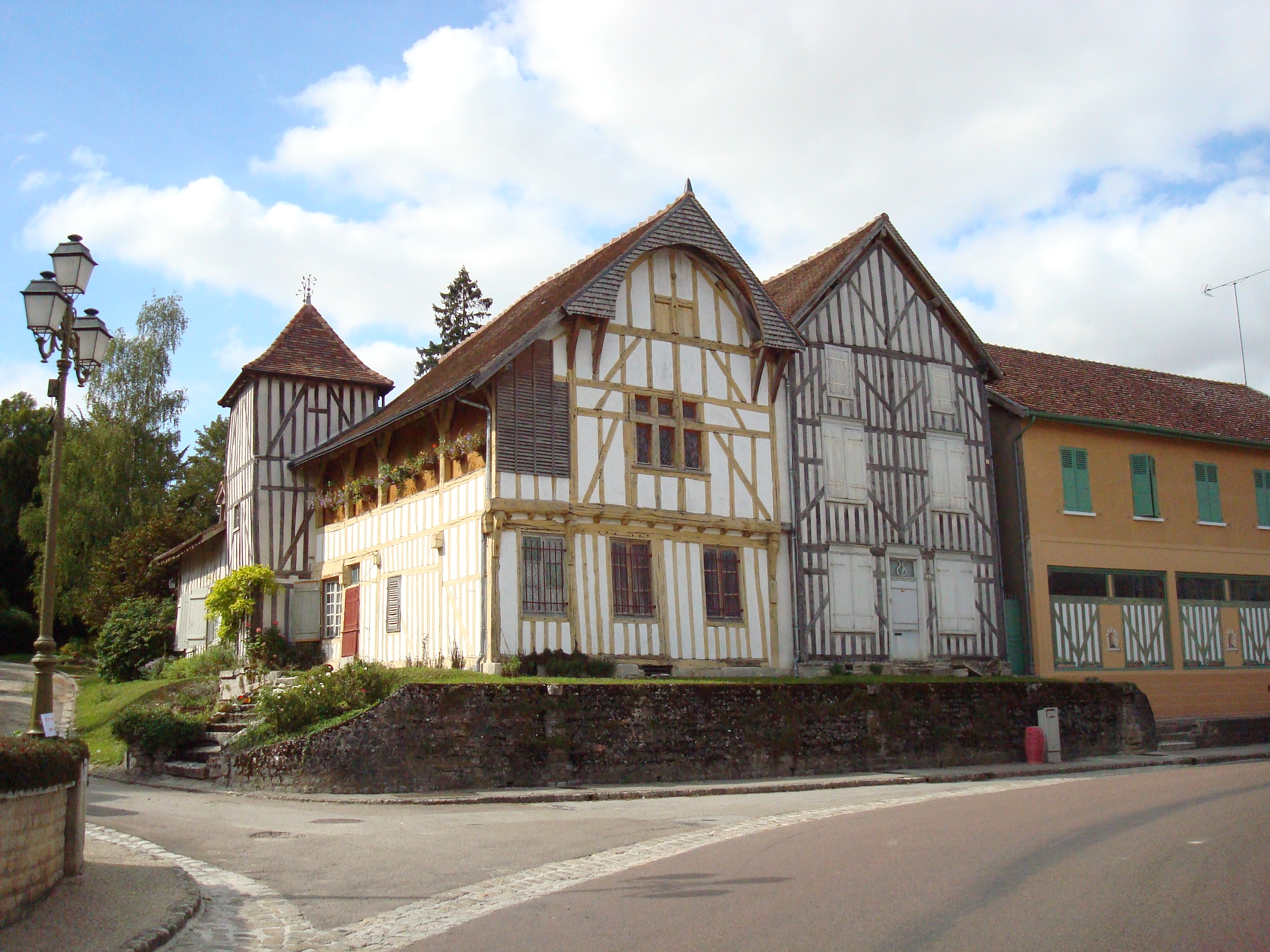 Maisons de Chavanges